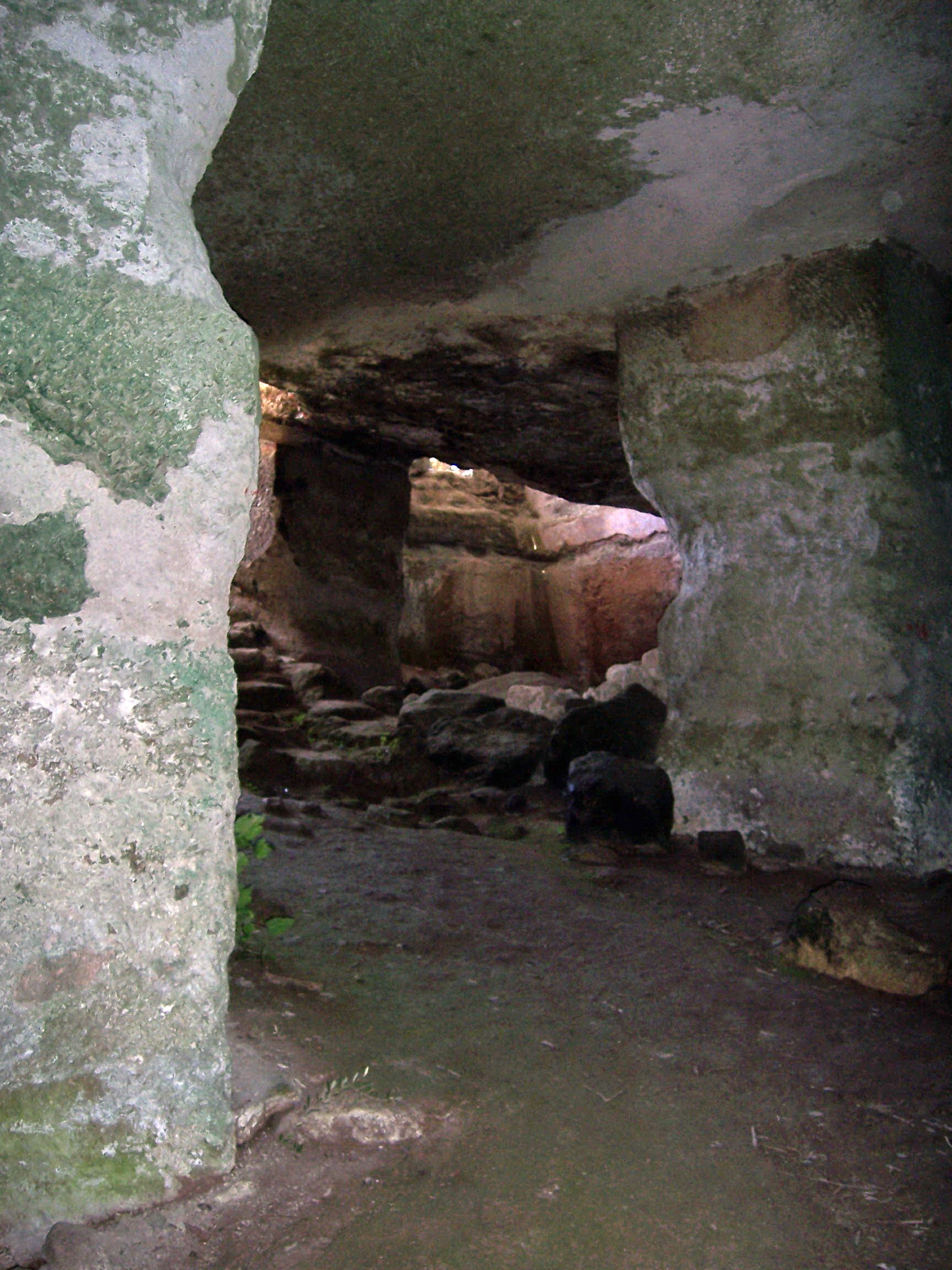 Citernes d'Eleftherna (vue partielle). Crète, Grèce